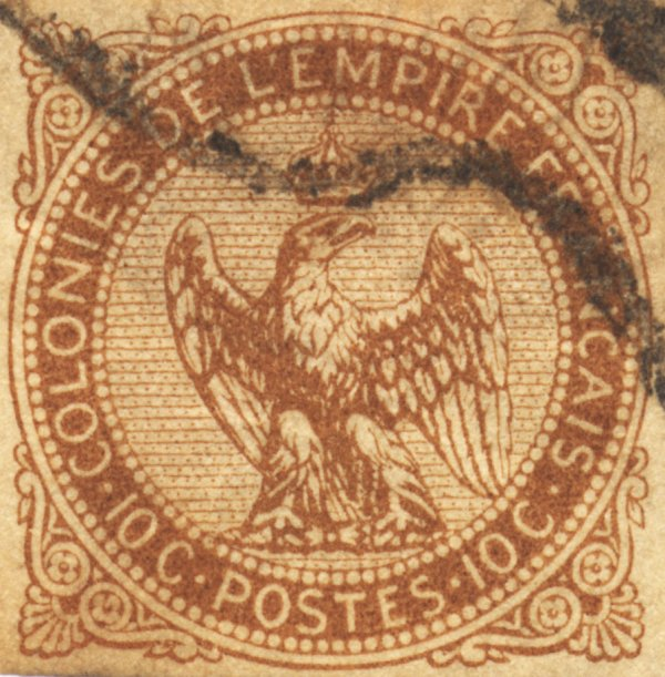 Aigle imperial, 1859.